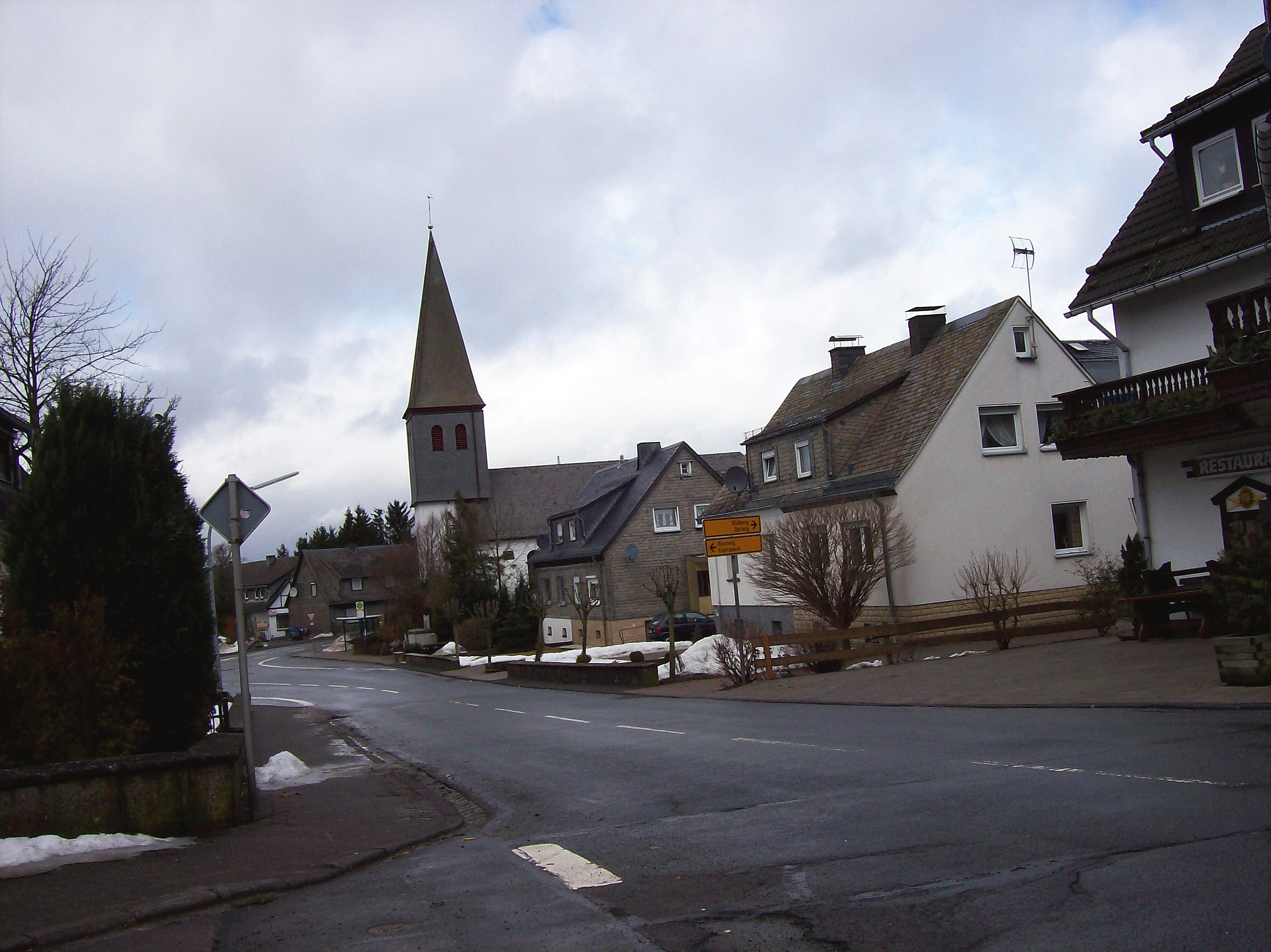 Bestwig-Andreasberg (Germany)